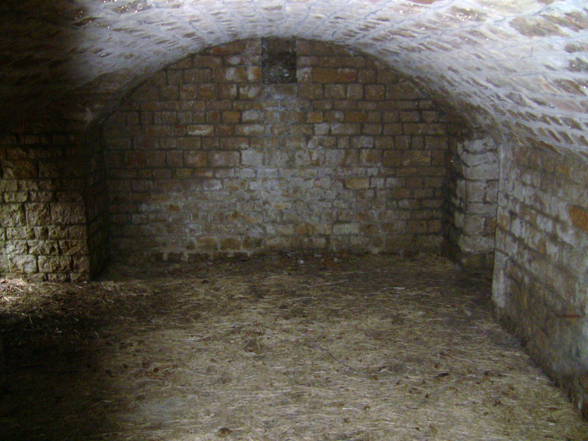 Intérieur d'une batterie annexe sud-ouest (la dernière en partant du fort) du fort de Planoise, à Besançon (Doubs, France).